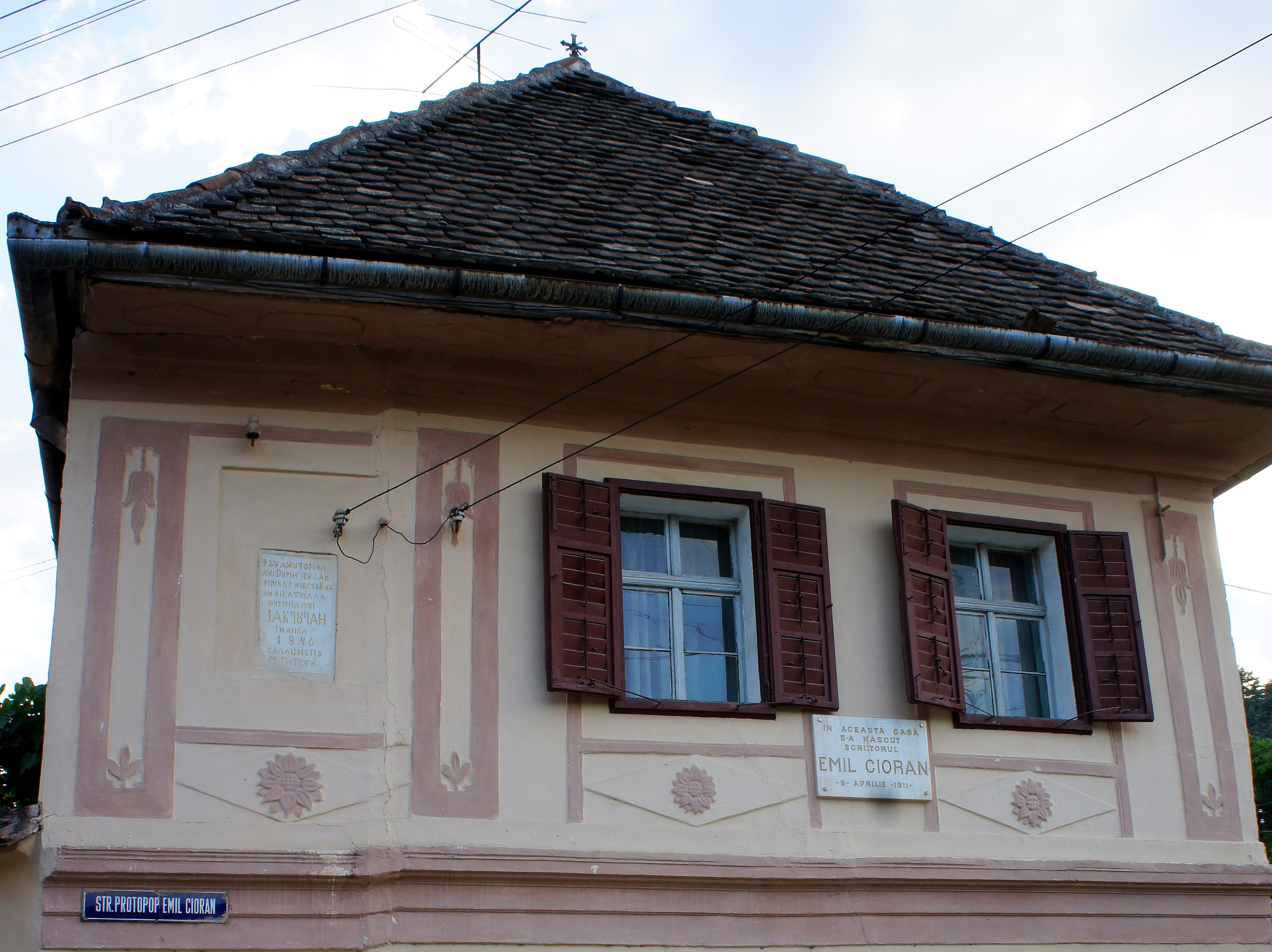 les yeux de Răşinari